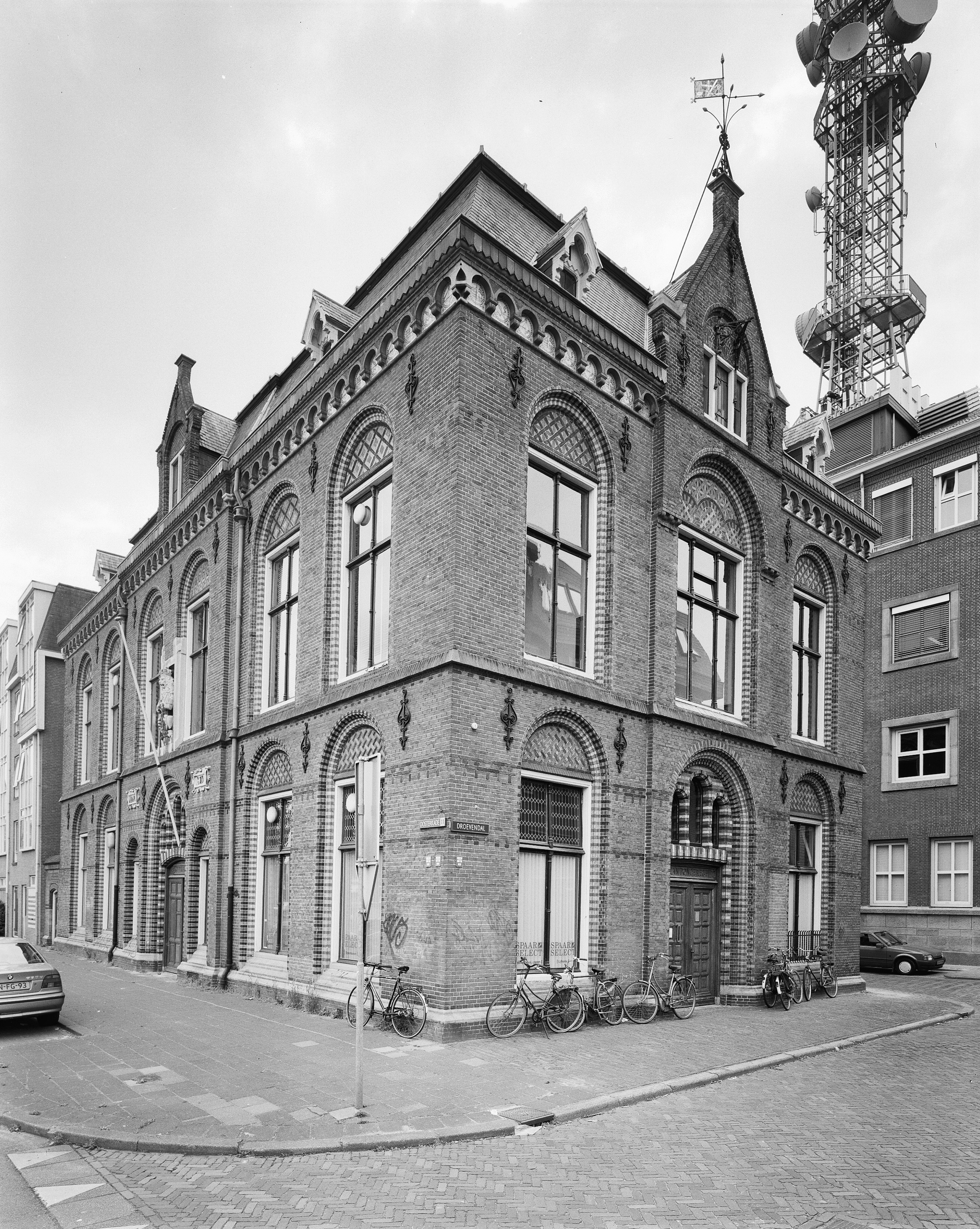 Kantongerecht: Overzicht voorgevels kantongerecht en ijkkantoor (opmerking: Gefotografeerd voor Monumenten In Nederland Friesland, bladzijde 203)